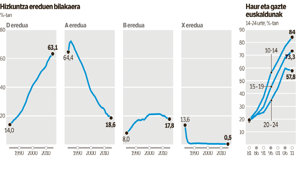 EAEko hizkuntza ereduen bilakaera